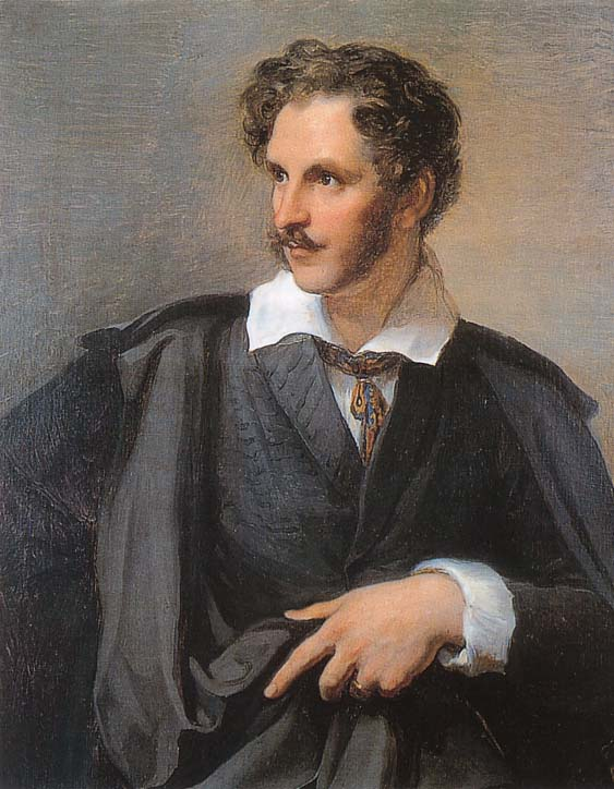 Portrait des August Grahl (1791-1868)